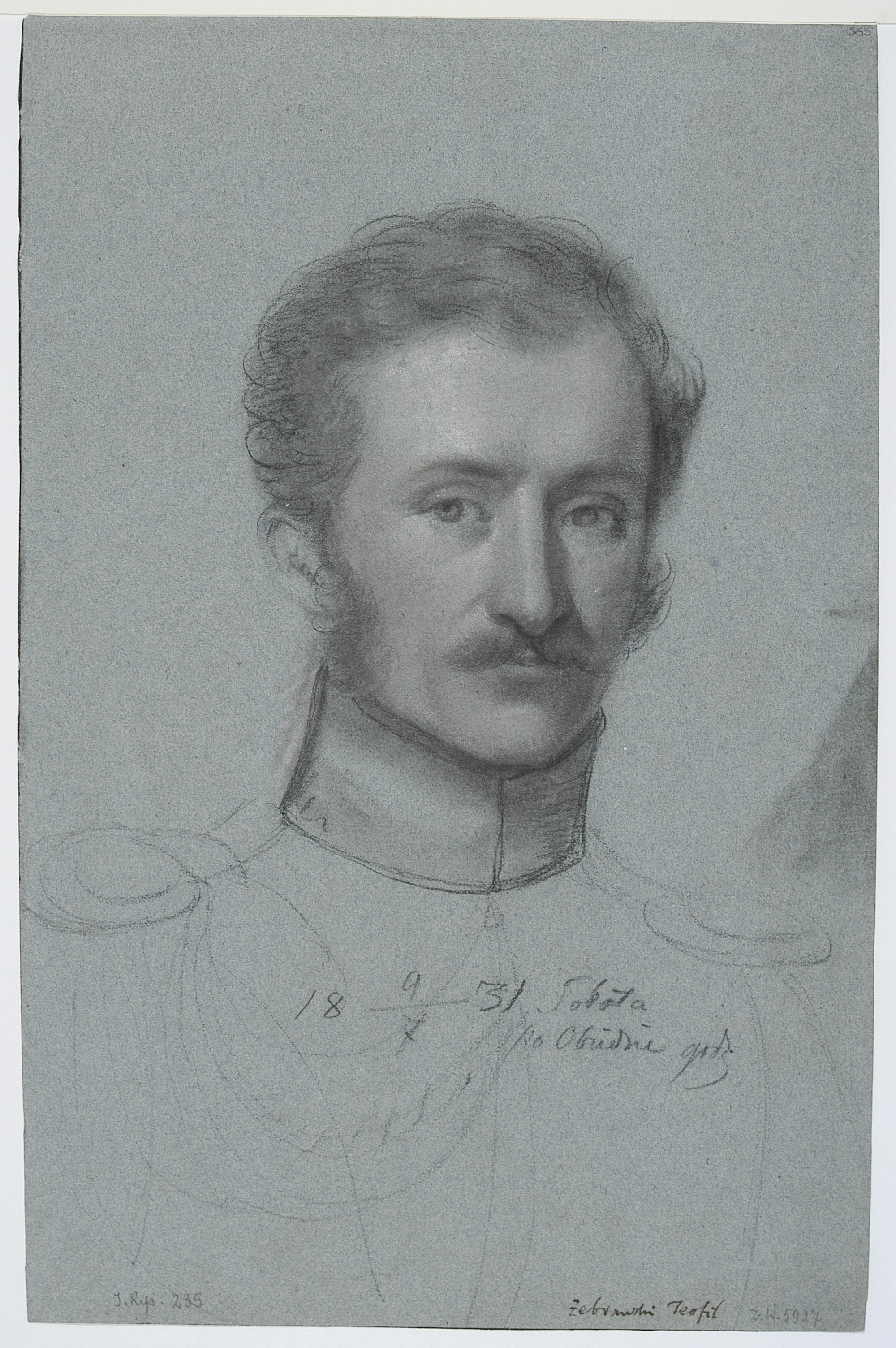 Autoportret Teofila Żebrawskiego, 1830 r.